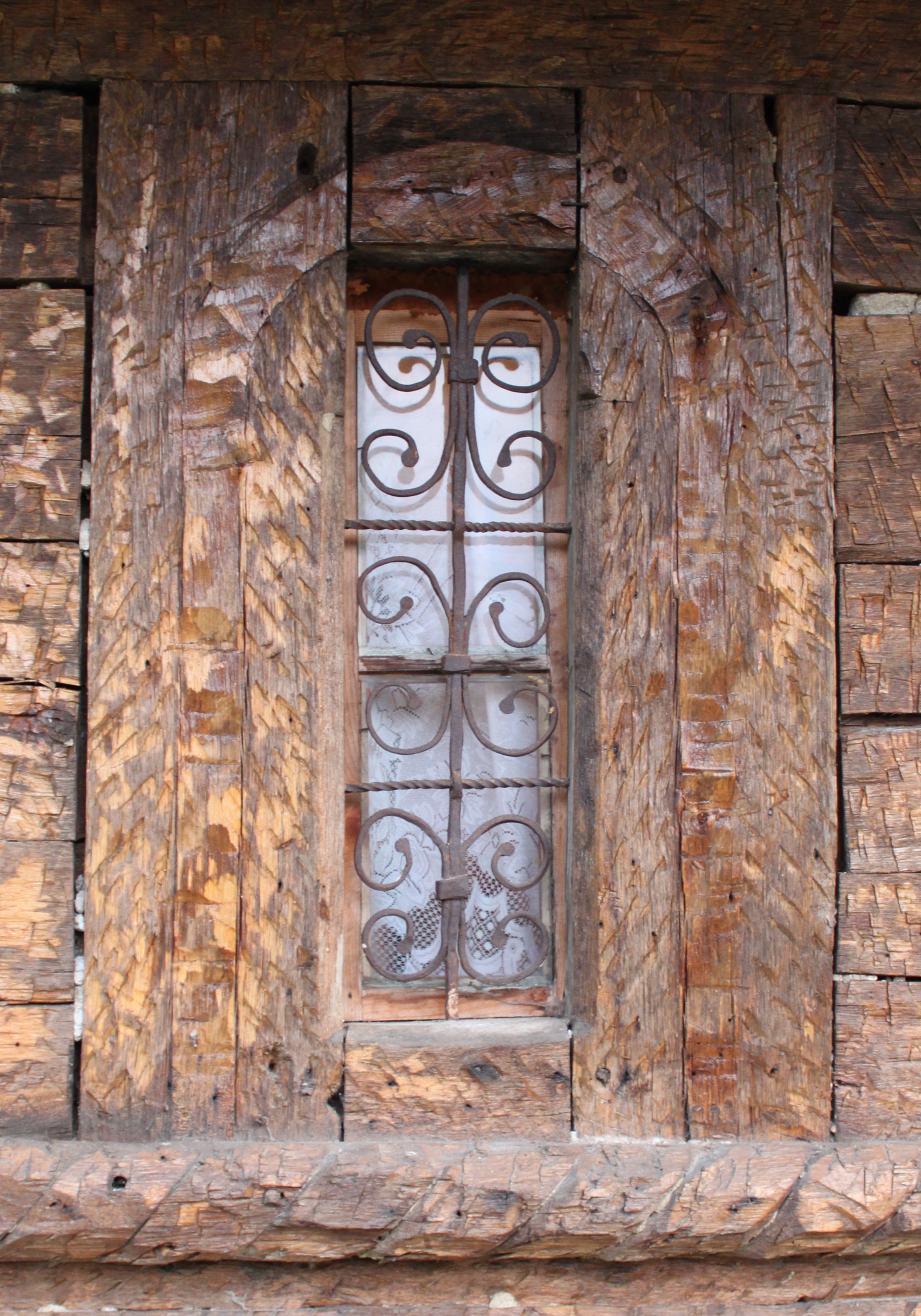 Biserica de lemn din Valea Faurului, judeţul Argeş.